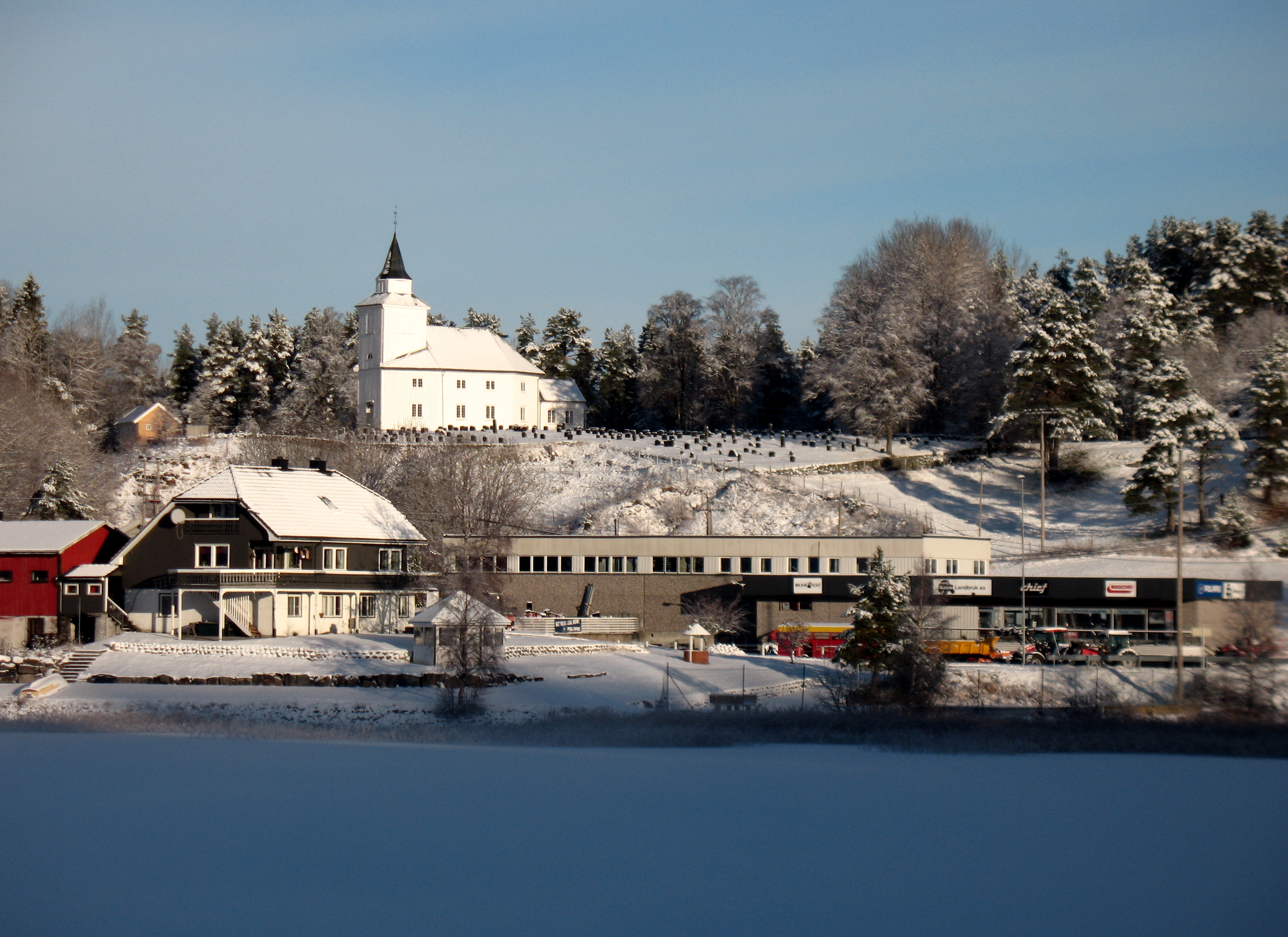 Hægeland kirke og grenden Hægeland i Vennesla kommune, Vest-Agder. Hægelandsvannet og Suggeheia. Fra syd.